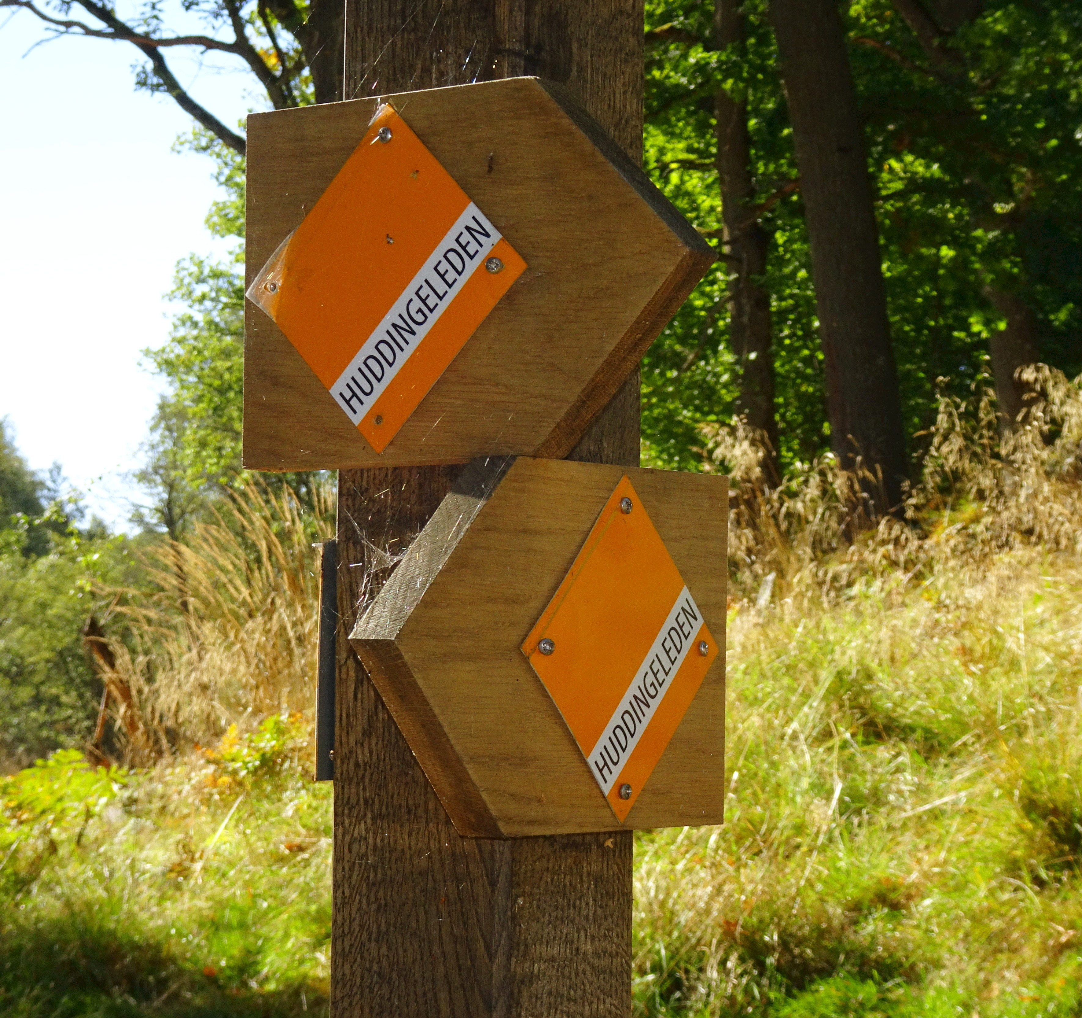 Huddingeleden skylt vid Orlången